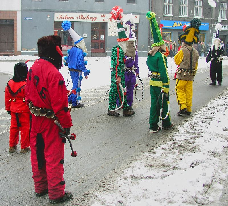 Dziady żywieckie – Jukace – Jukoce – zwyczaj ludowy odprawiany na Żywiecczyźnie. Zdjęcie Jurbox